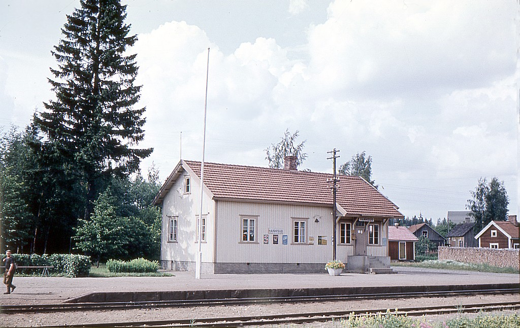 Hanhisuon asema (Urjalan tienoilla) v. 1956.